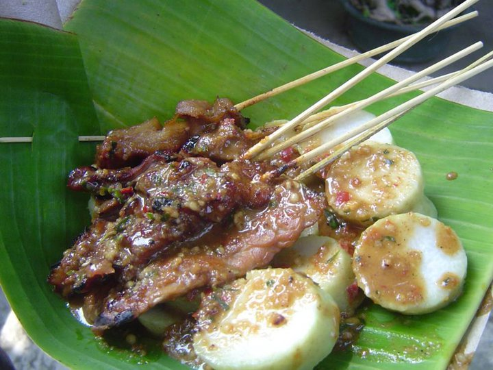 Sate kere, lontong dan sate daging Sapi yang dibakar, kemudian diberi sambal kacang yang pedas